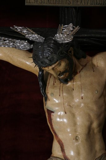 Santísimo Cristo del Amor. Obra anónima atribuida a Juan Bautista Vázquez, El Viejo.